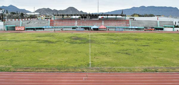 estadio